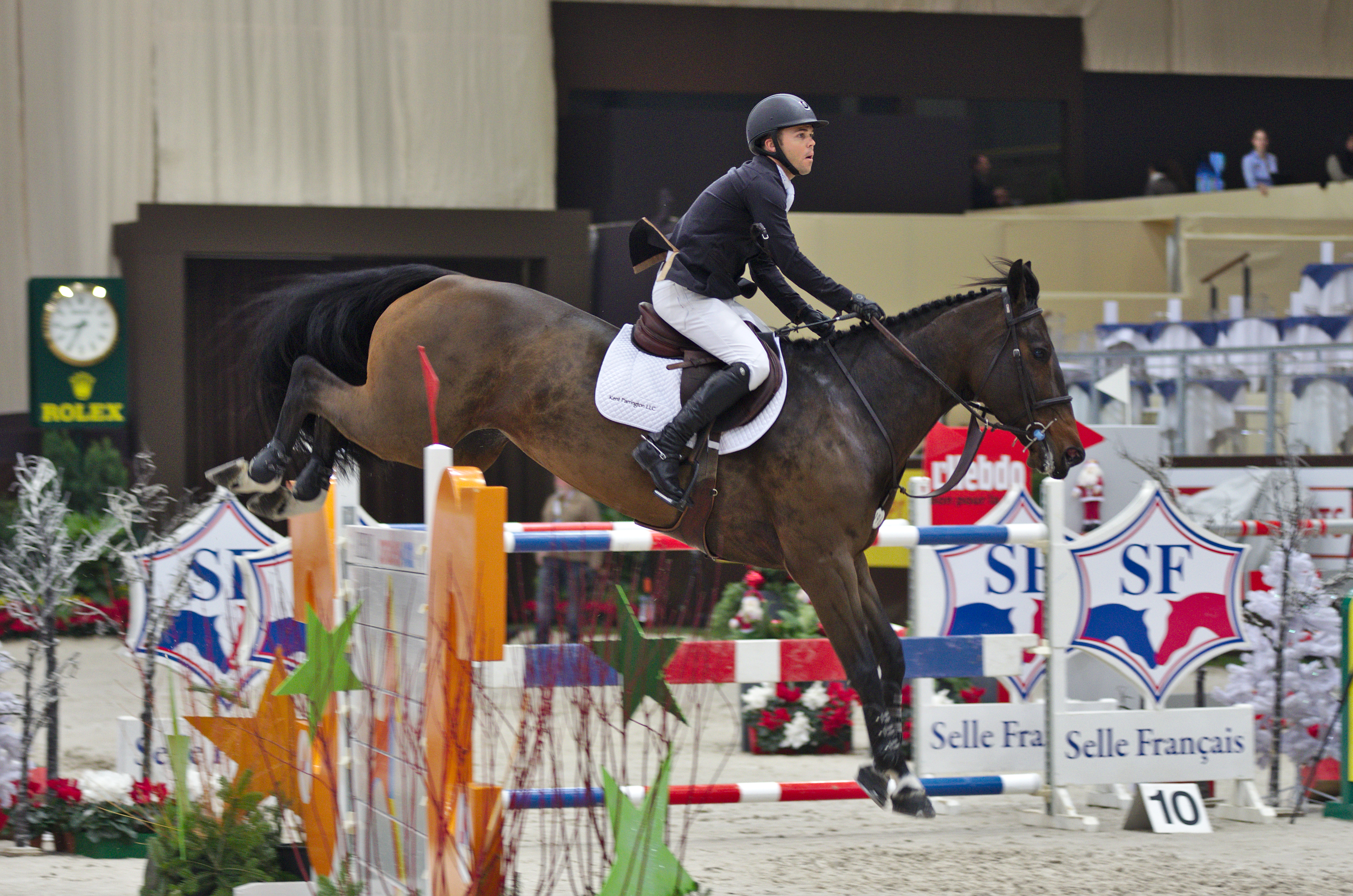 CHI Genève 2013 - 20131212 - Kent Farrington et Blue Angel